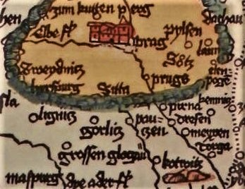 Die Stadt Cottbus, wird Kotwitz geschrieben. Ausschnitt einer dänischen Pilgerkarte um 1500 von Erhard Etzlaub (um1460 bis1531/32).